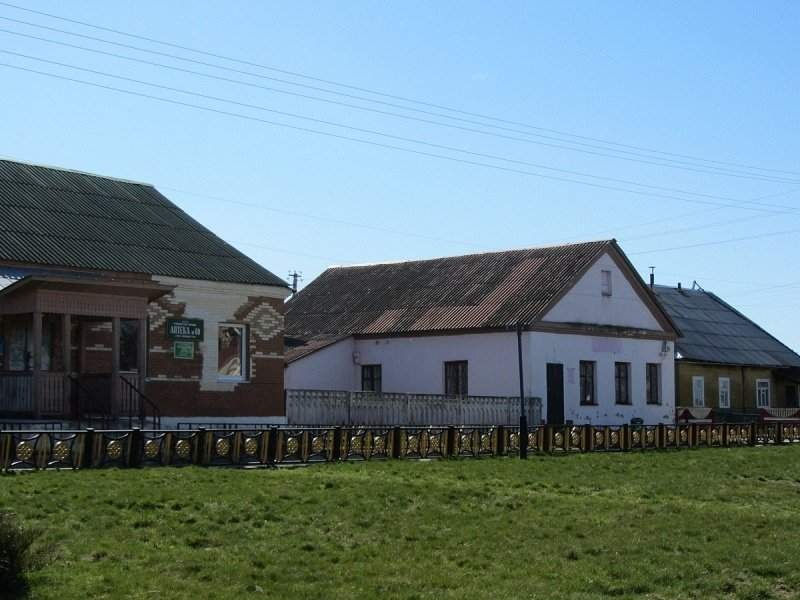 Турэц (Карэліцкі раён). Забудова